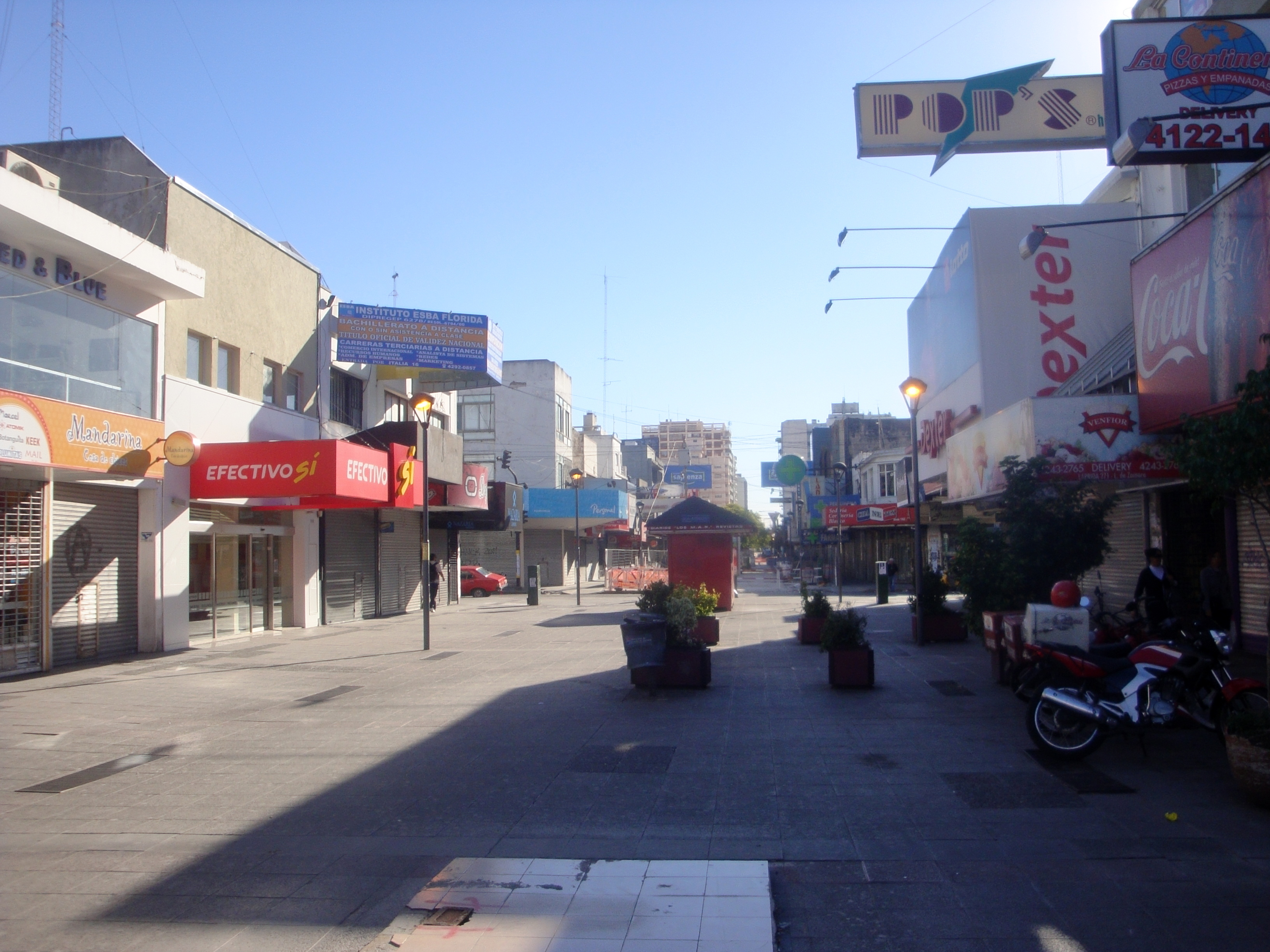 Calle peatonal Laprida, ubicada en el centro de la ciudad de Lomas de Zamora.